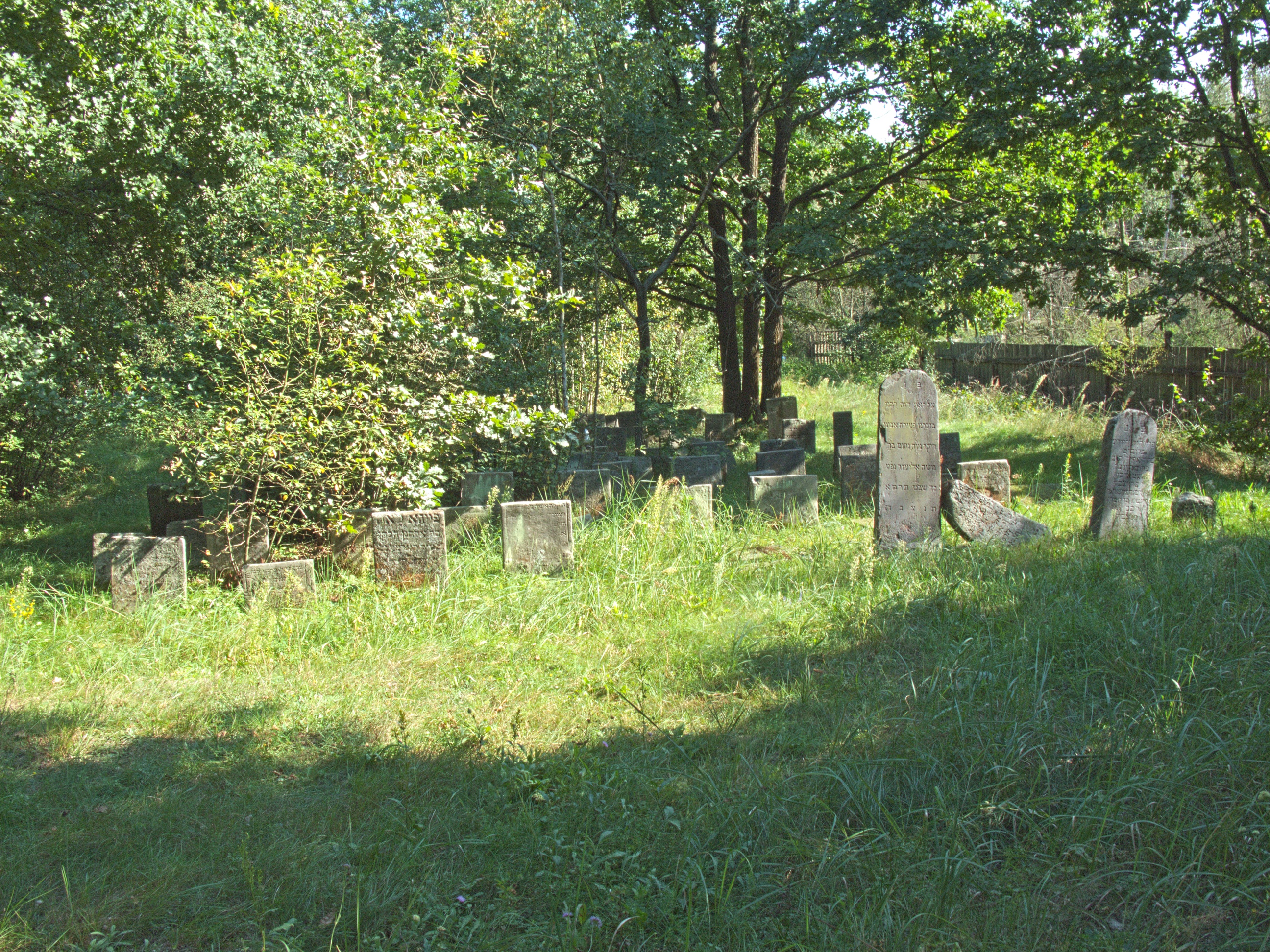 Cmentarz żydowski w Brańsku.